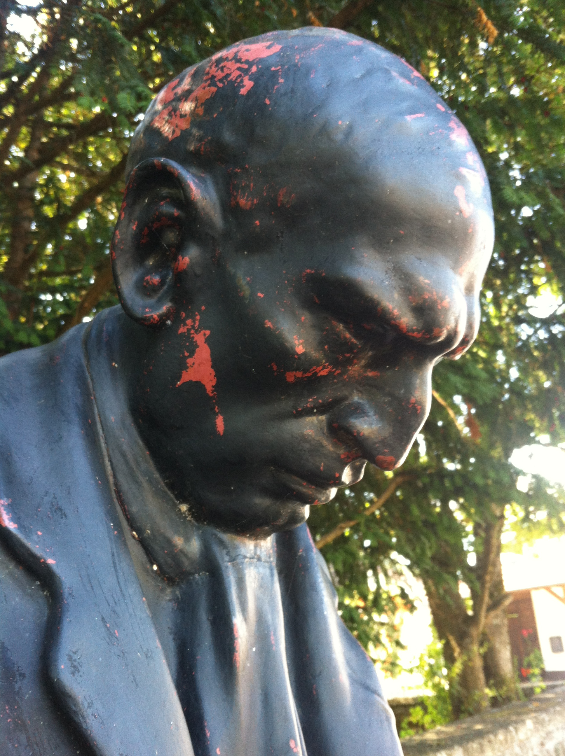 BB Blumberg, Stadt im Schwarzwald-Baar-Kreis in Baden-Württemberg. Von 1934 bis 1942 wurde Blumberg von den Nazis zur „Bergbaustadt“ (Doggererz) getrimmt. Die Skulptur "Schwarzer Mann" erinnert noch an diese Zeit. (Kopf der Skulptur).